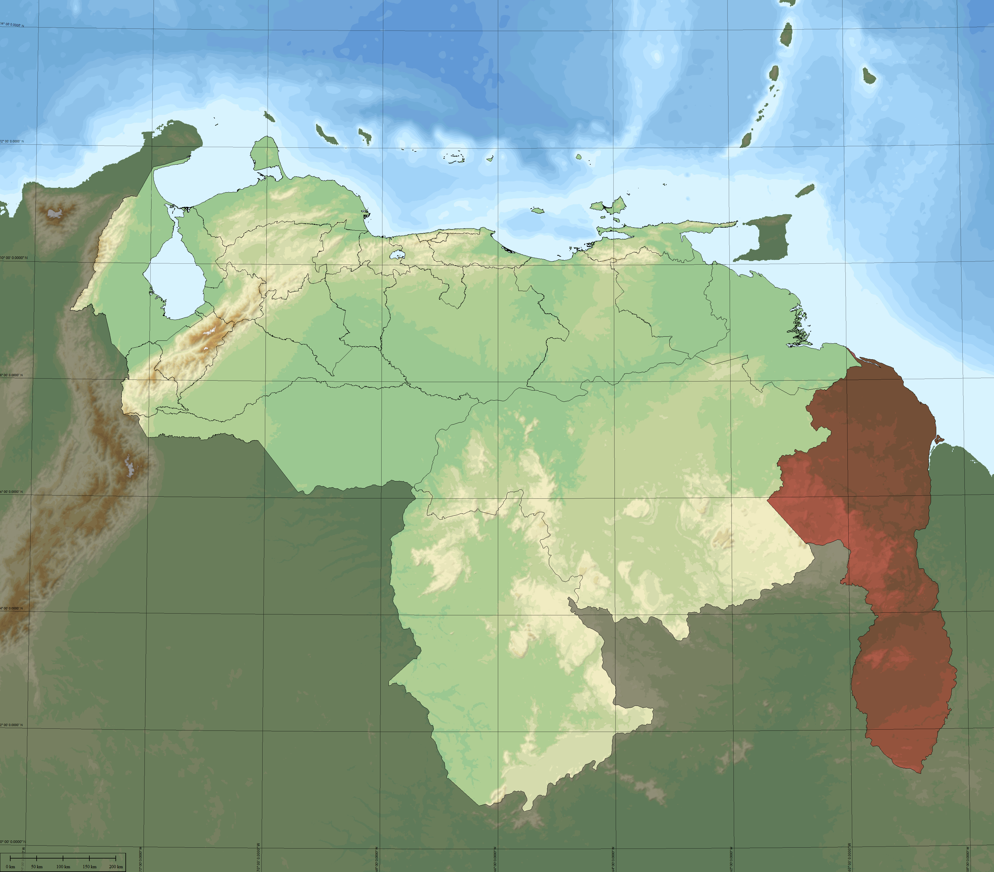 Mapa de relieve físico de Venezuela